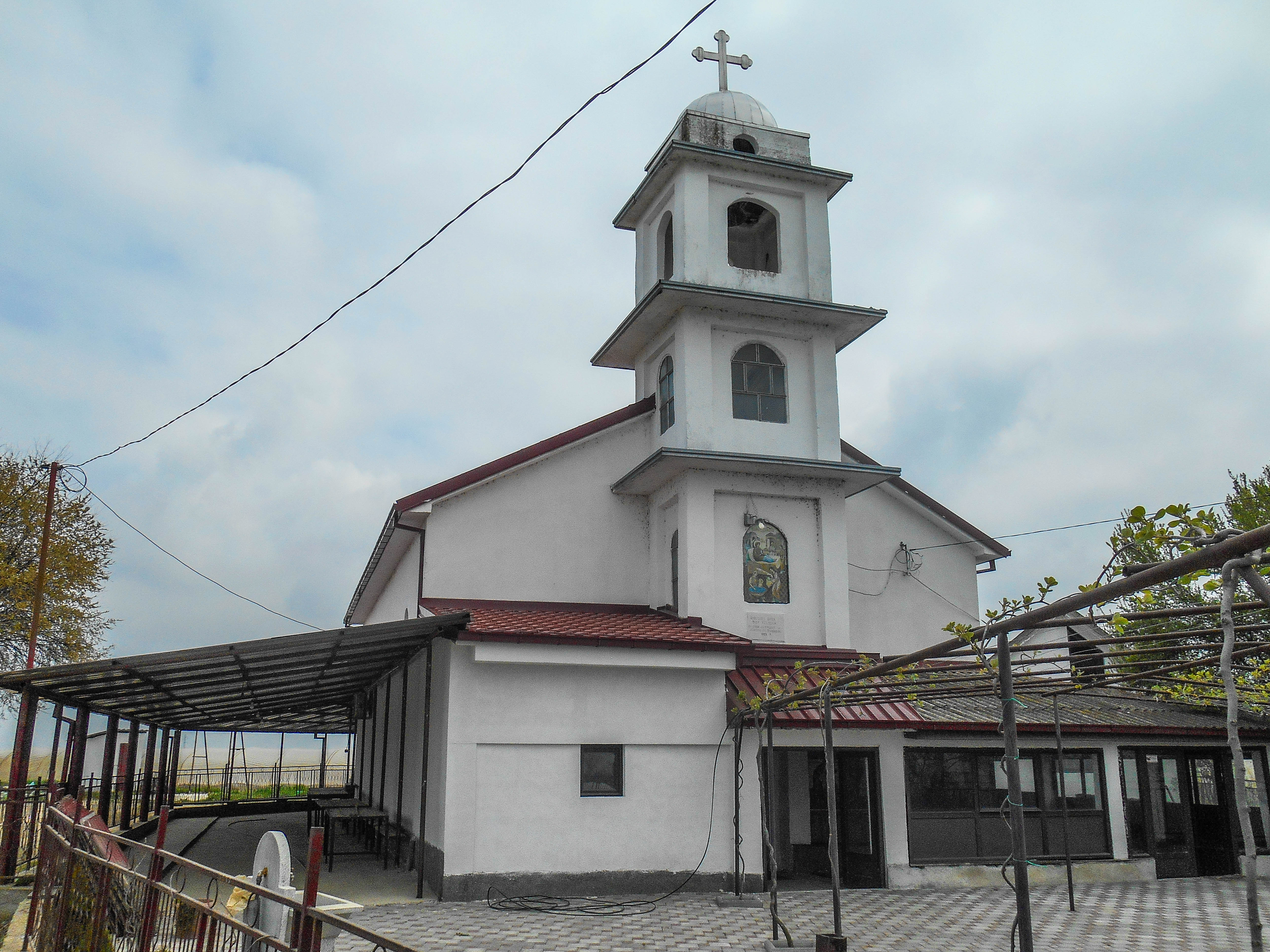 Црквата Рождество на Пресвета Богородица